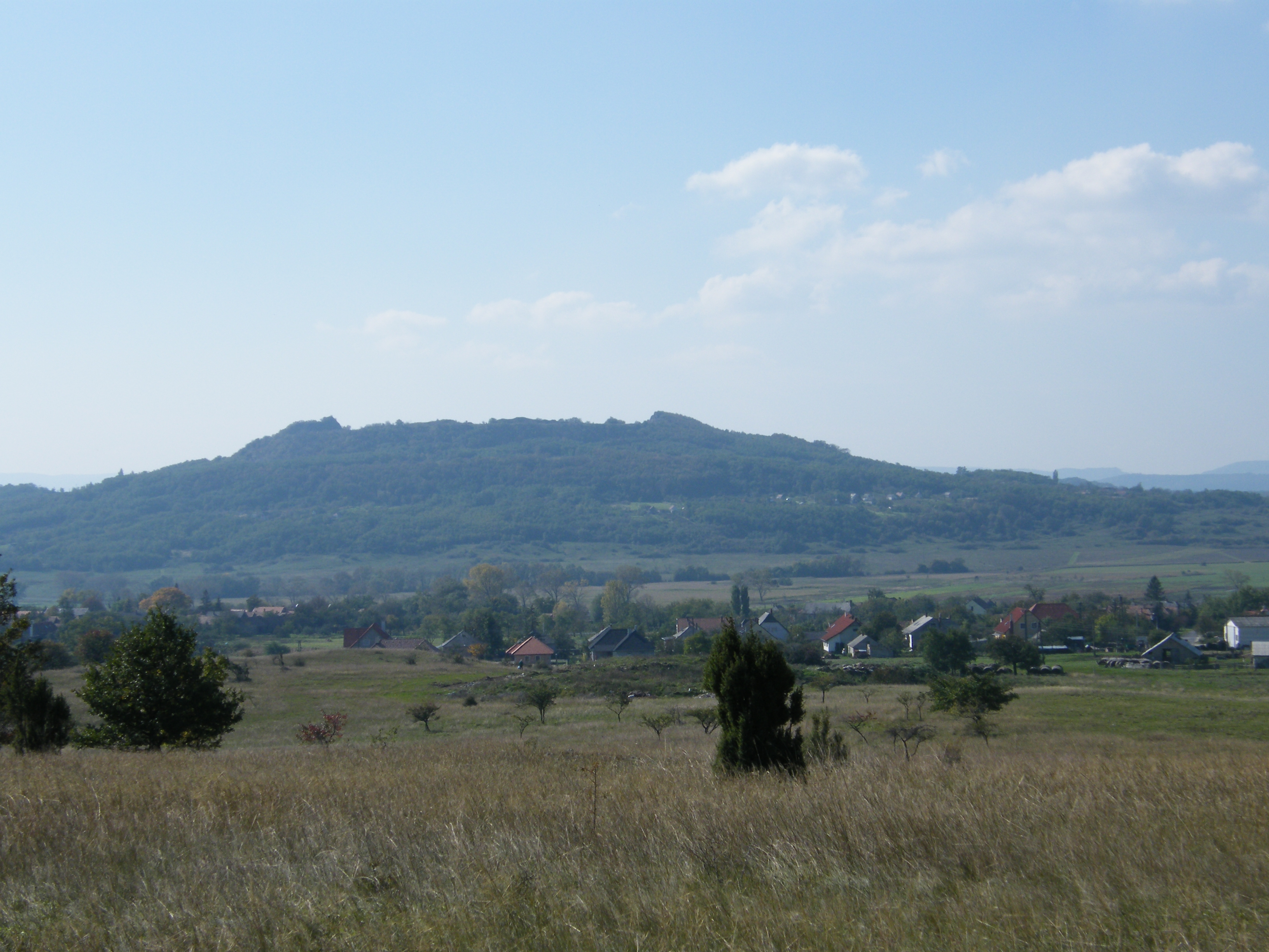 Haláp hegy Sáskáról